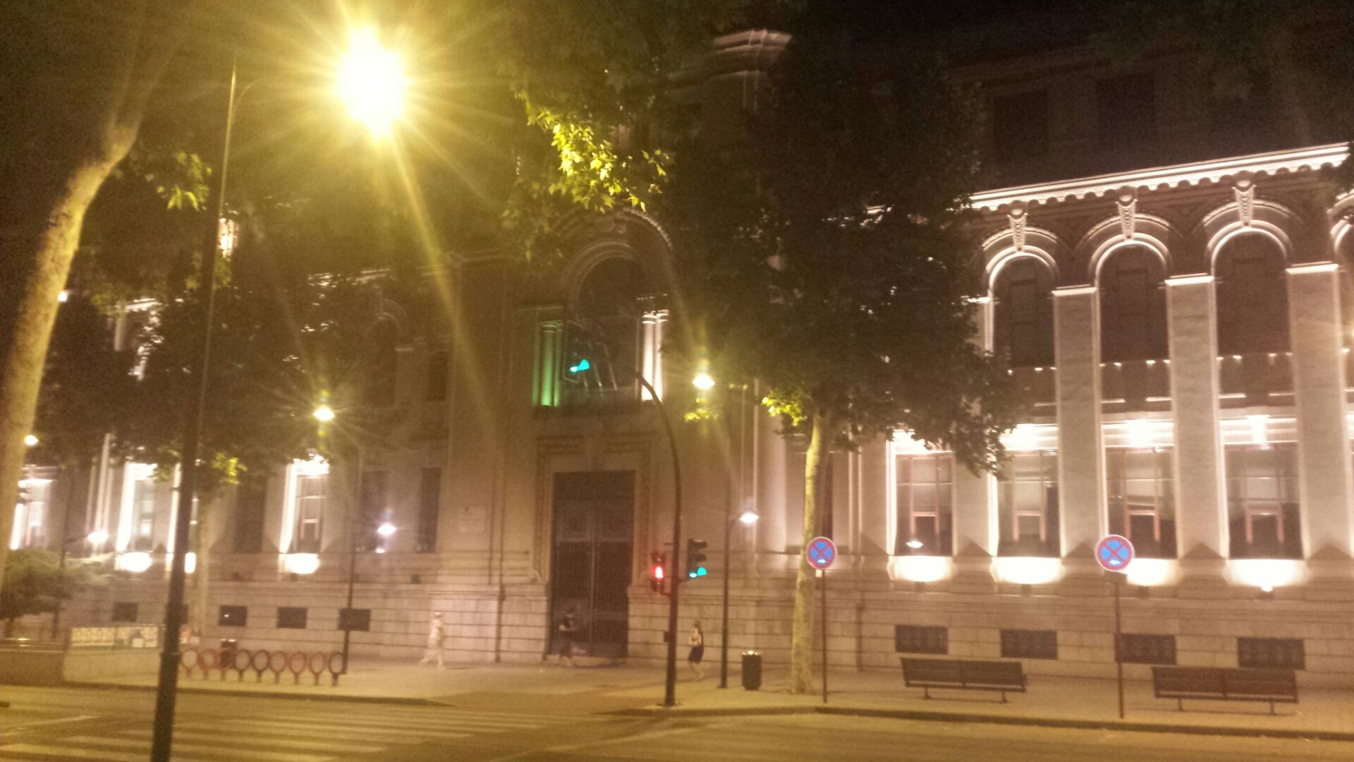 Monumental edificio del Instituto Bachiller Sabuco iluminado de noche.